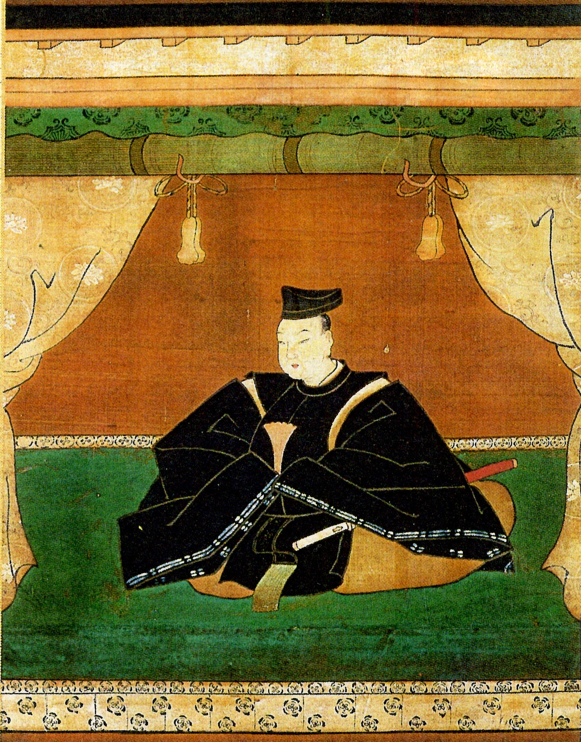 龍造寺高房の肖像。